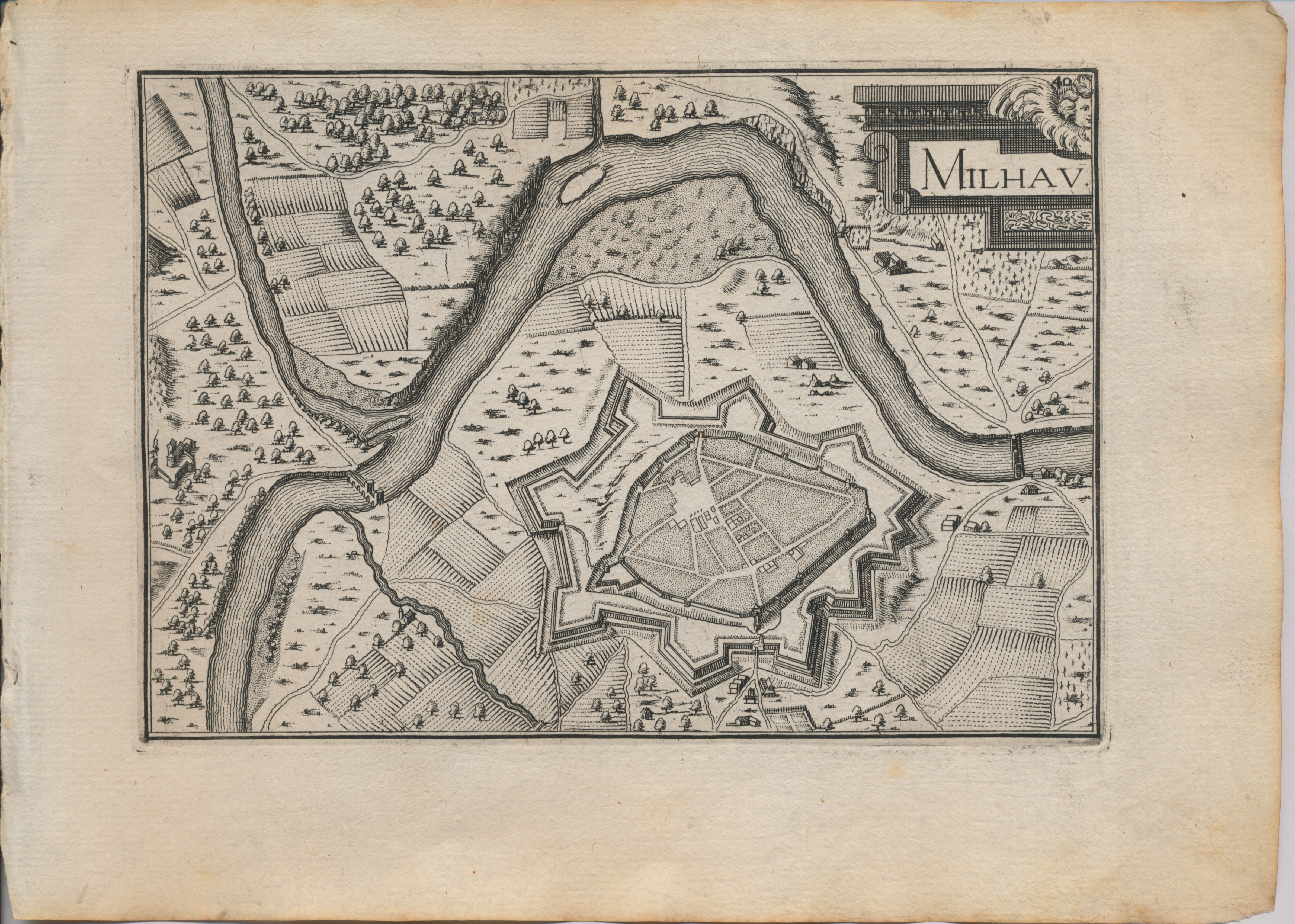 Gravure extraite de "Les Plans et Profils de toutes les principales villes et lieux considérables de France. par le Sieur TASSIN, géographe ordinaire de sa Majesté. A paris, Chez Melchior Tavernier, en l'Isle du Palais. 1634" (Province de Languedoc)